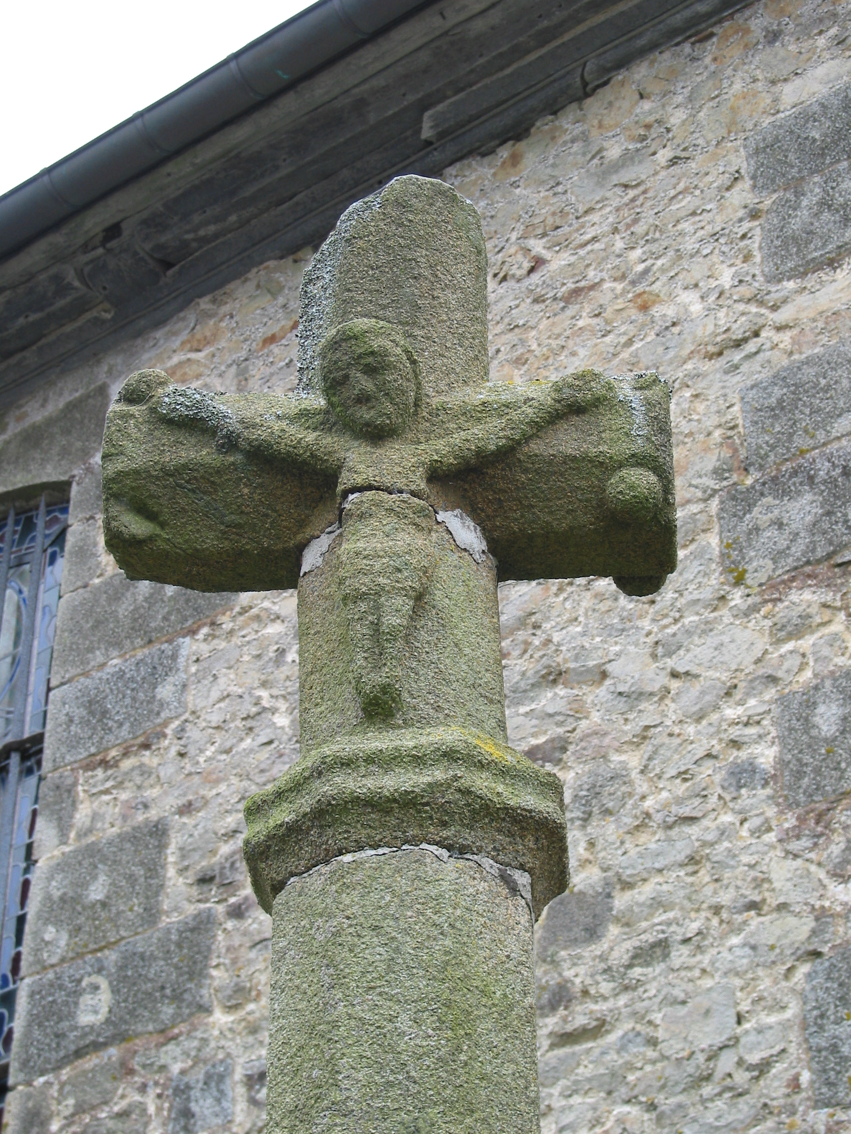 Croix du 16e siècle en granit hexagonale. Christ sculpté au sommet. .